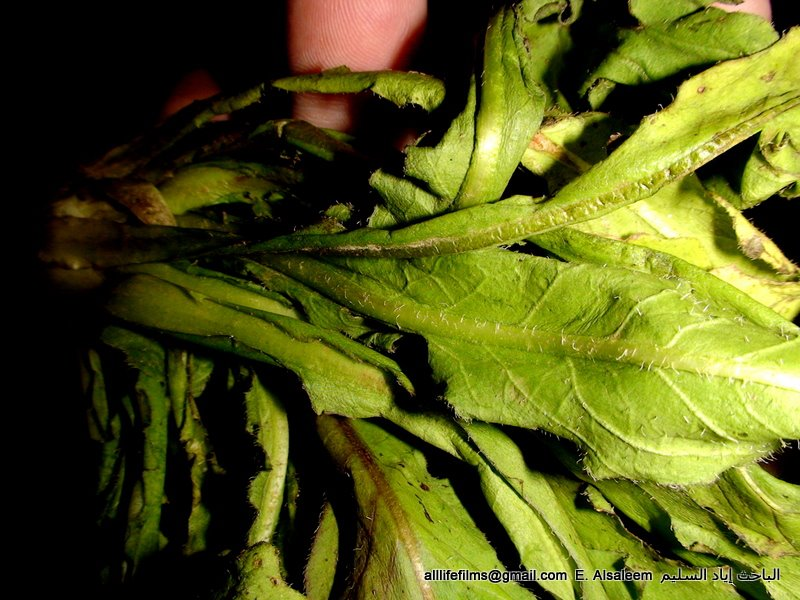 نباتات برية سورية تؤكل